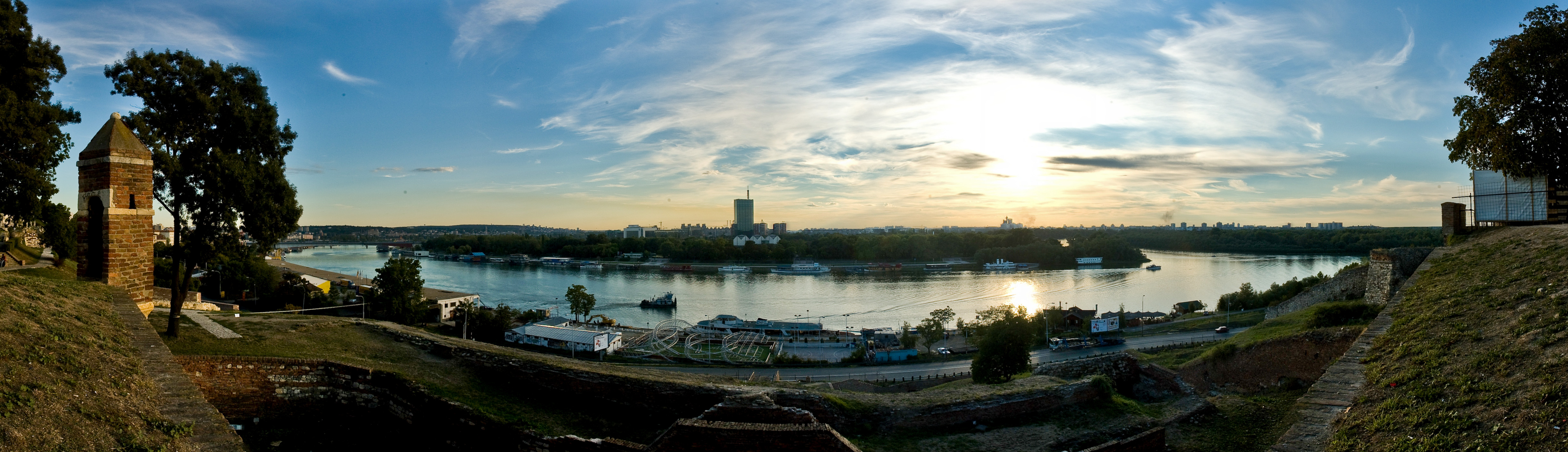 Sava river in Belgrade